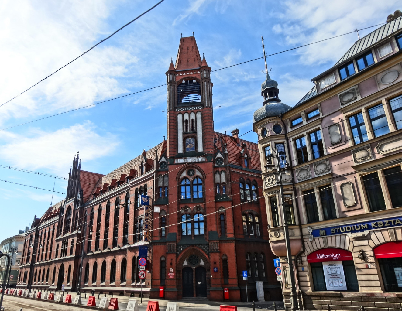 Ulica Jagiellońska w Bydgoszczy. Budynek Poczty Głównej z wieżą (1883-1899)